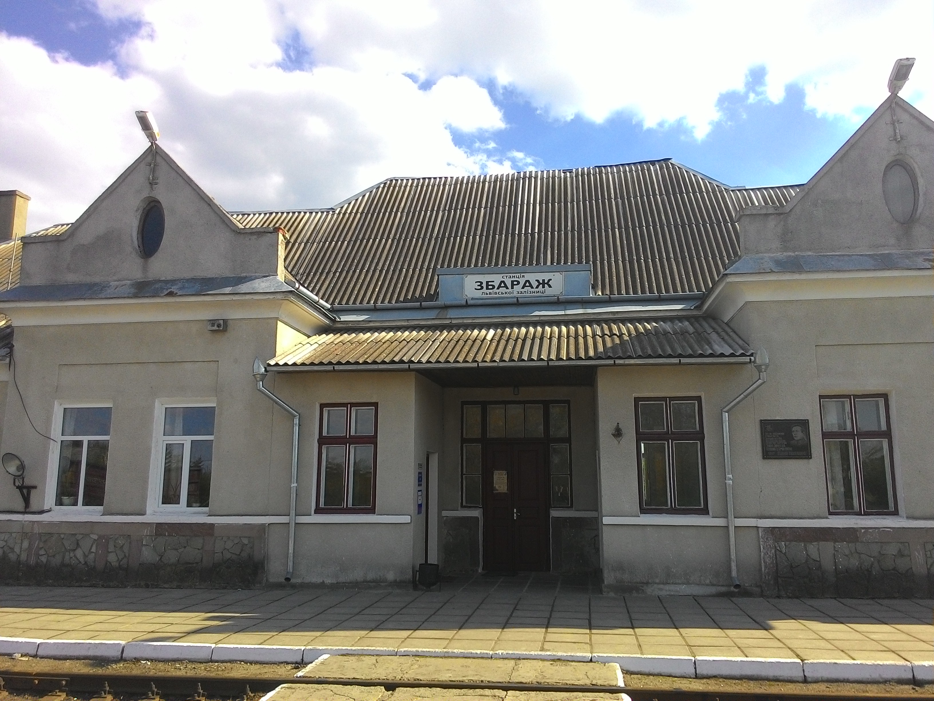 Залізнична станція "Збараж"